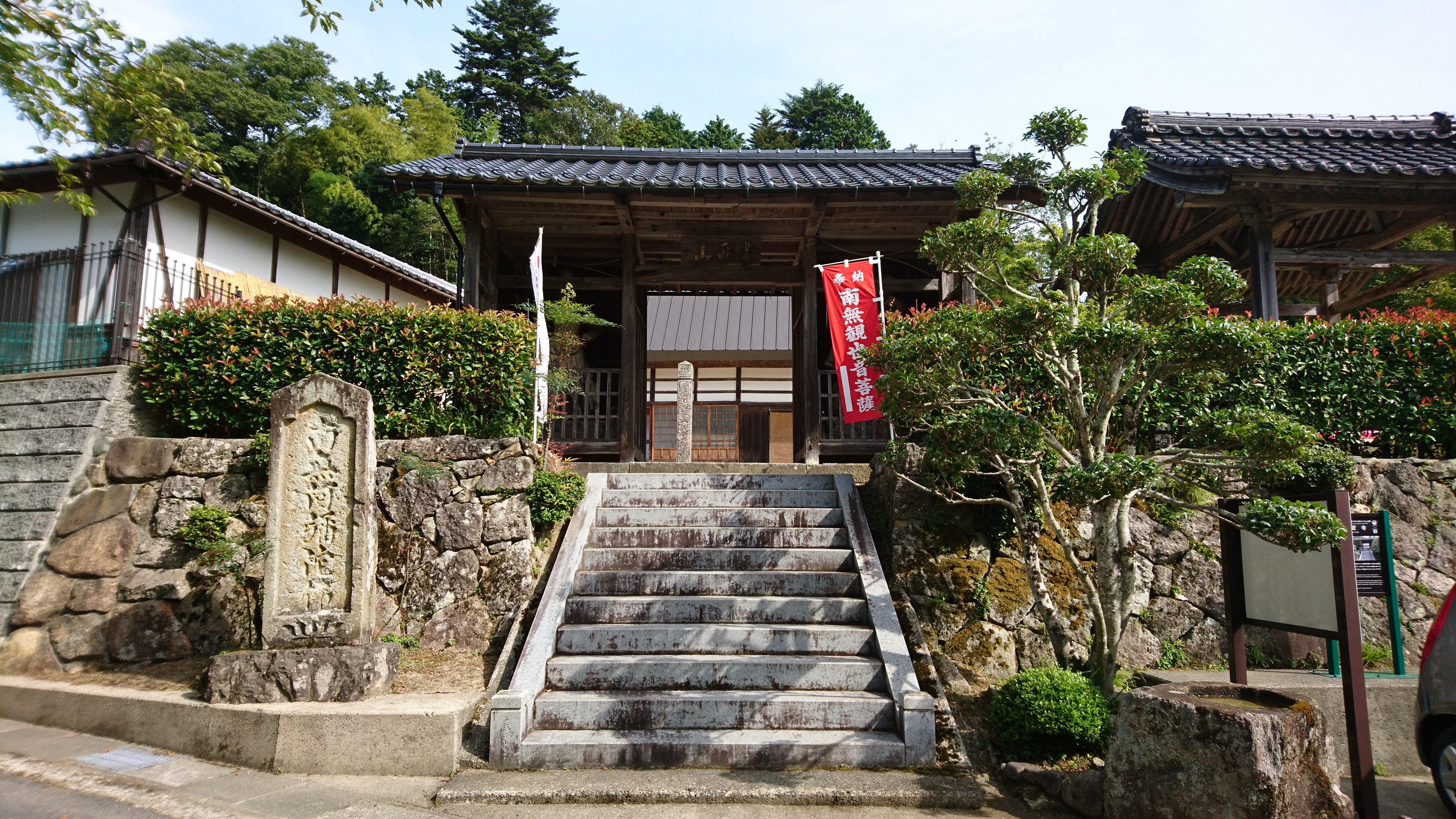 絹屋佐平治が丹後縮緬の創織を願い、断食祈願を行った禅定寺（京丹後市峰山町小西）